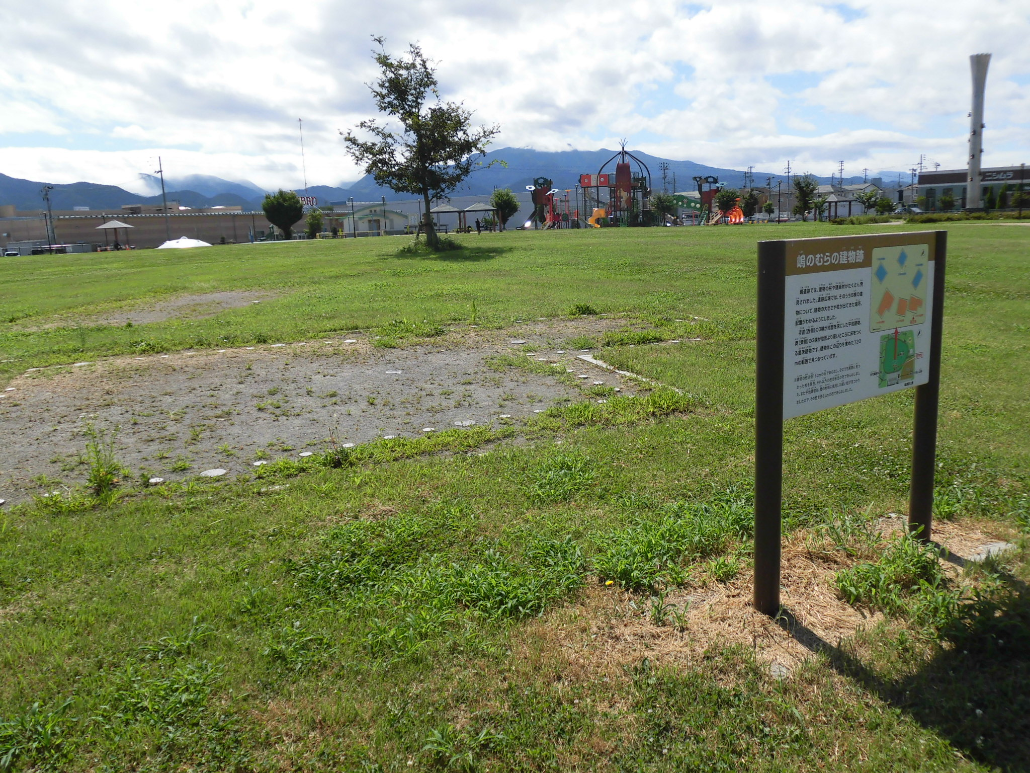 嶋遺跡公園。山形県山形市嶋。古墳時代後期の集落跡。国指定史跡。土地区画整理事業に伴い遺跡公園として整備。園内には史跡部分と子供用の遊具広場が共存。